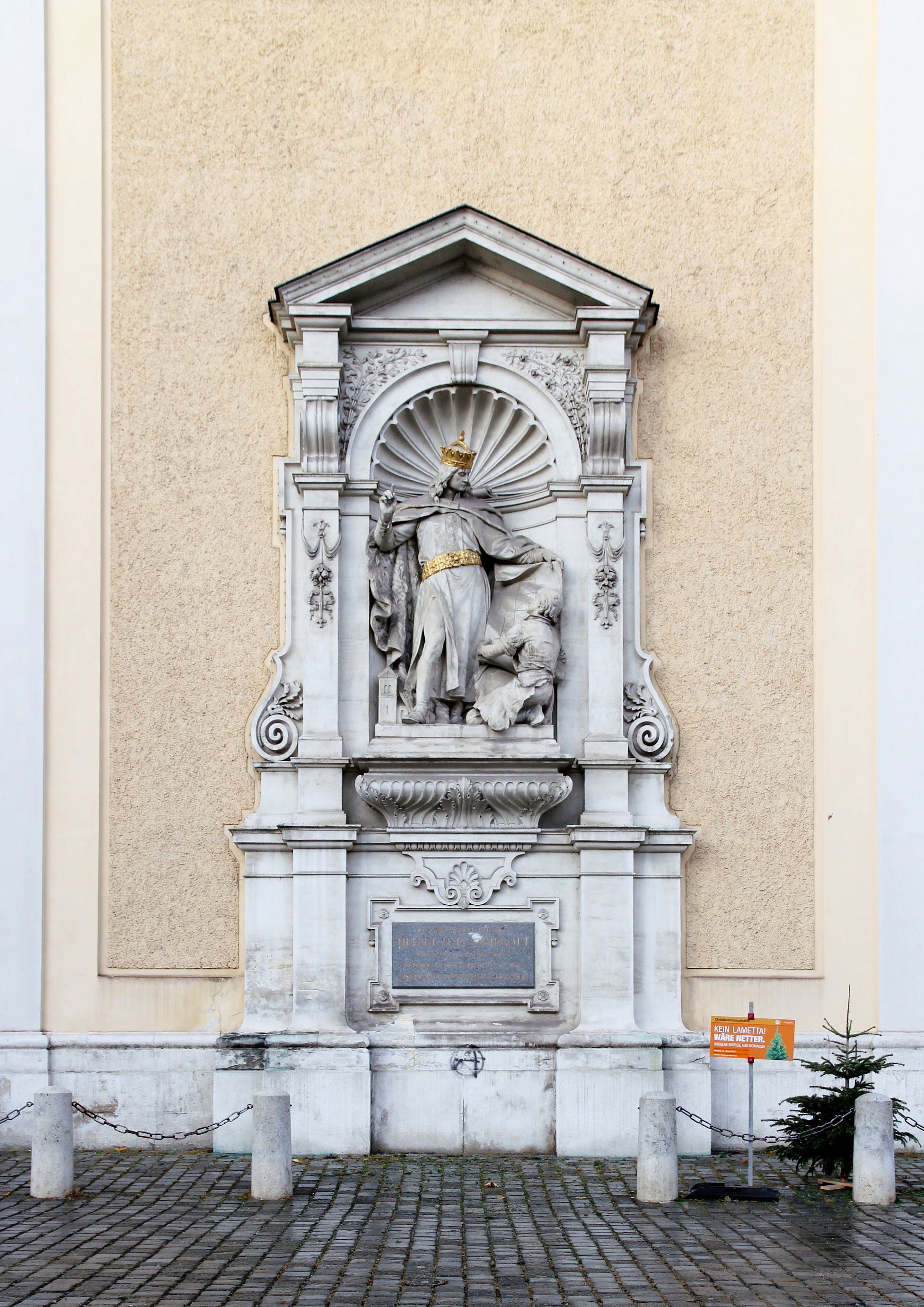 Standbild von Heinrich II. (Jasomirgott), dem Gründer des Schottenstiftes in Wien, an der südseitigen Außenwand der Stiftskirche. 1893 vom Bildhauer Josef Breitner (1864-1930) gefertigt.